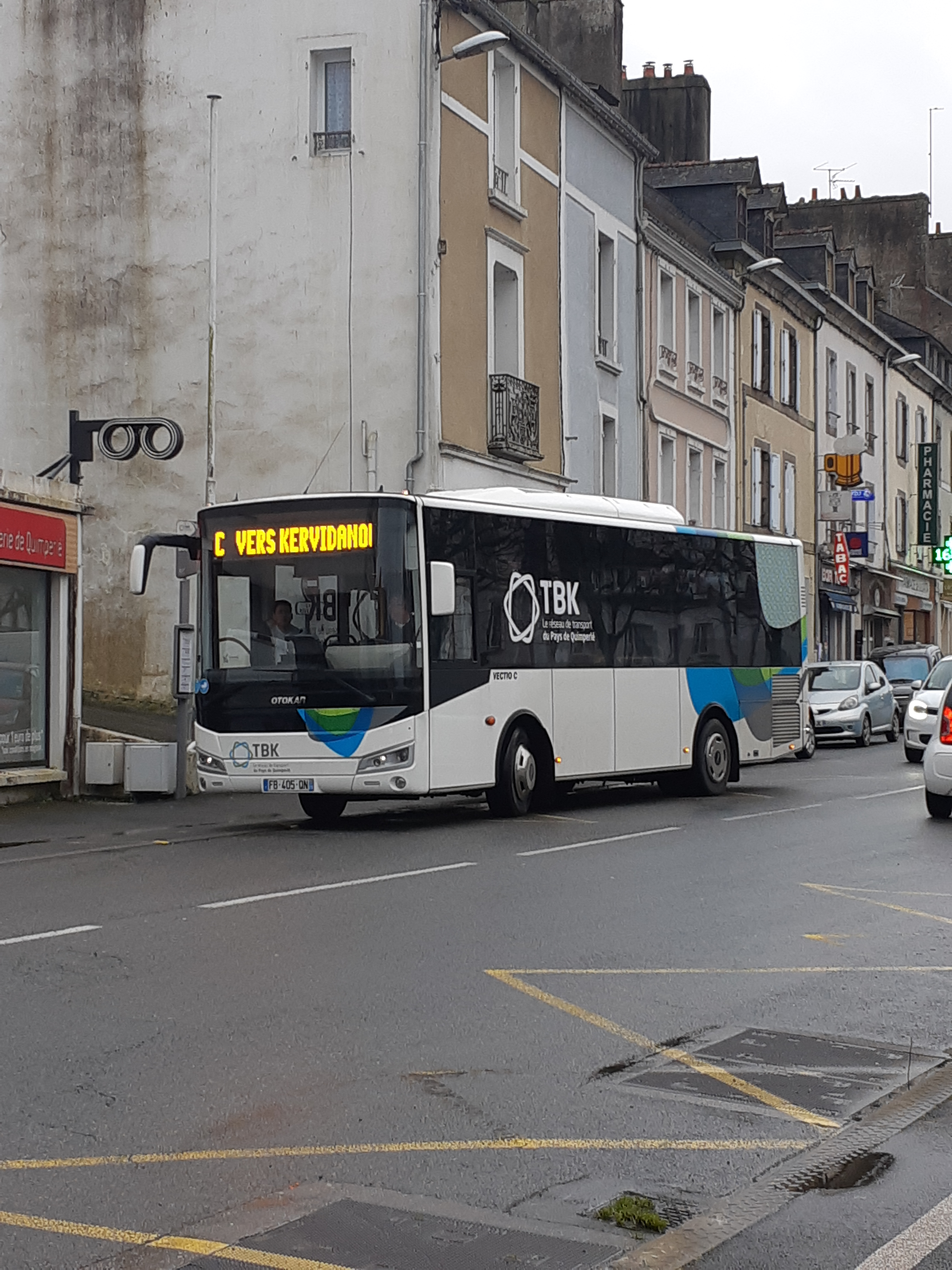 Un bus de ville Otokar Vectio C, officiant sur la Ligne C (vers Kervidanou) du réseau TBK, le 28 février 2020.